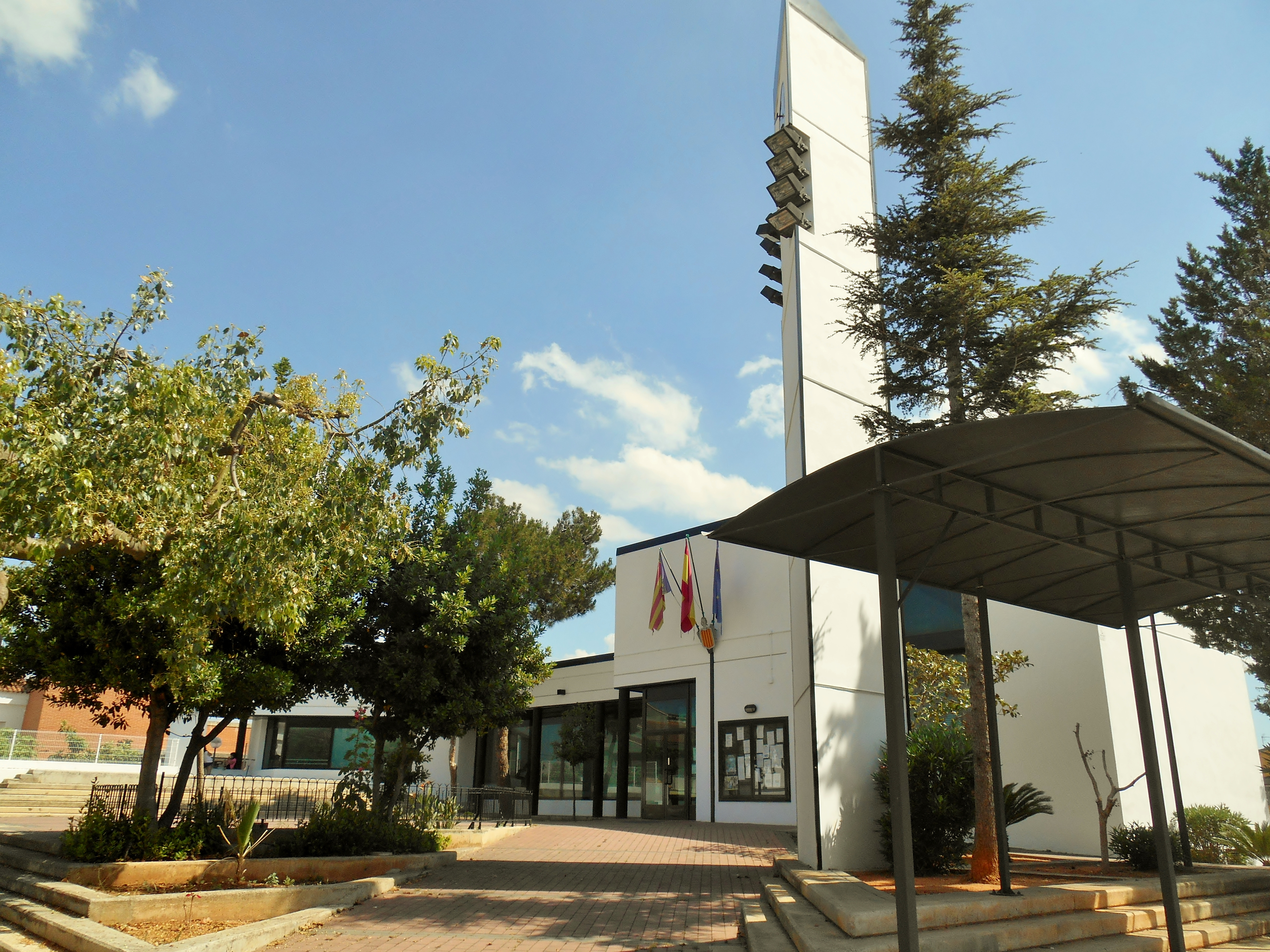 Senyera.